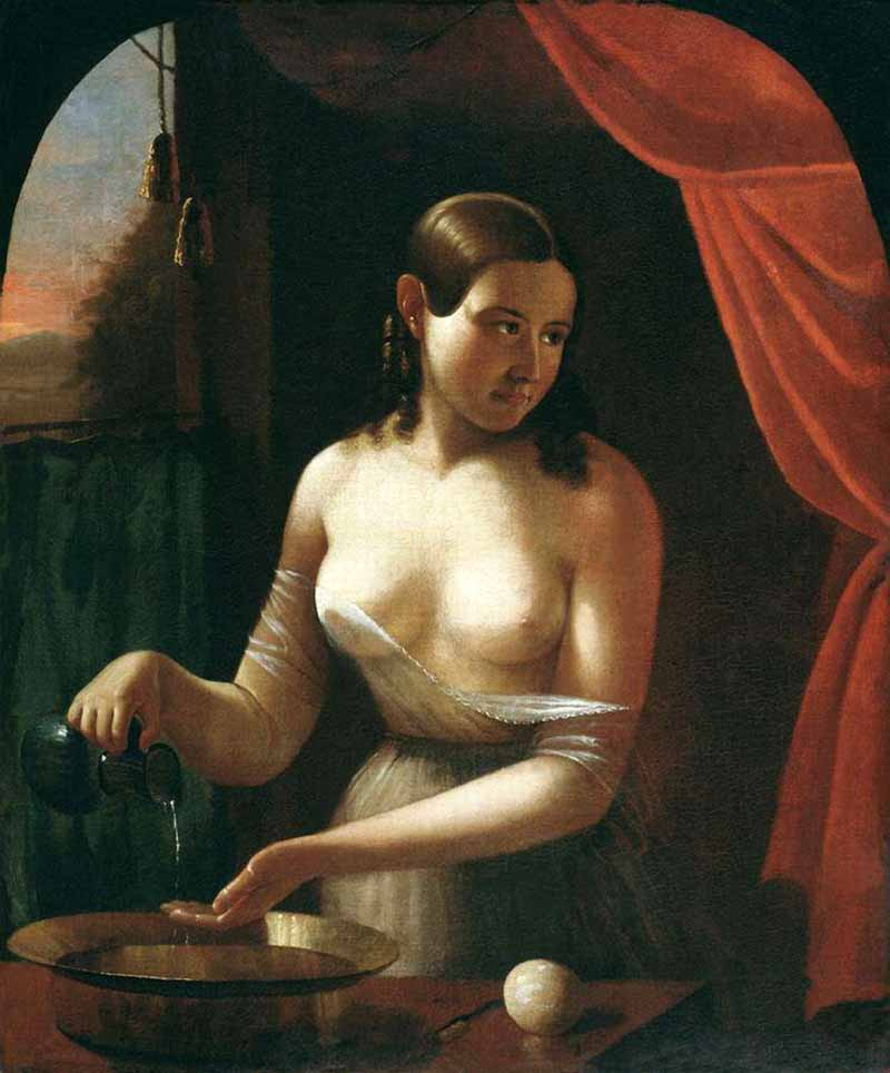 "Утро". Холст, масло. Харьковский государственный музей изобразительных искусств